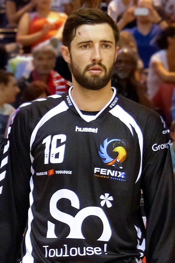 Cyril Dumoulin, gardien de l'équipe Fenix Toulouse Handball. Le 31 août 2014 lors de la finale du Challenge Marrane contre l'Union sportive d'Ivry à la Halle Carpentier, Paris 13e